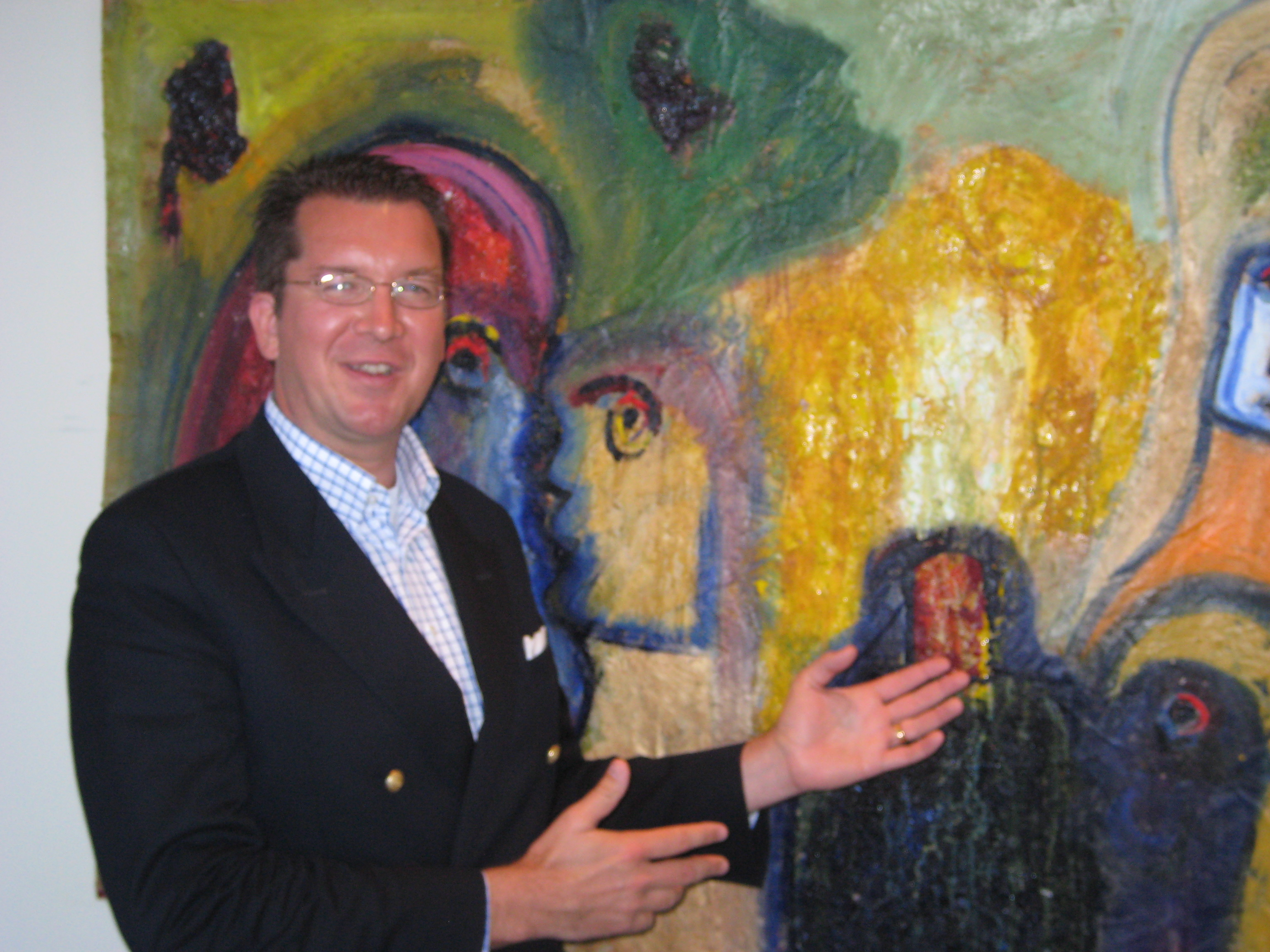 Dominicus H. Rohde virun engem Tableau vum Matt Lamb